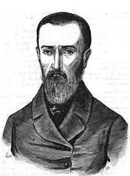 Louis Huber dit Aloysius Huber, né à Wasselonne en 1815, mort à Autun en 1865. Agitateur politique.